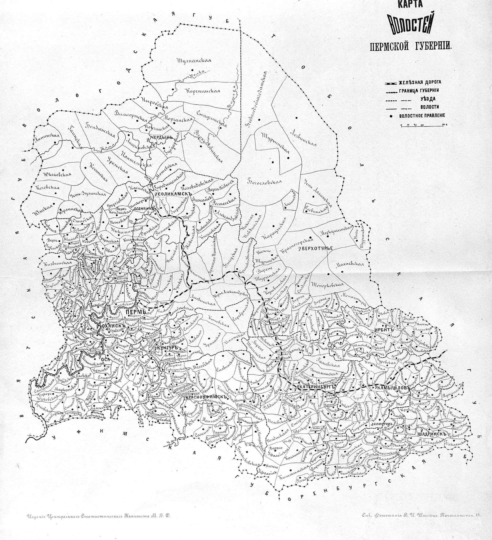 Карта волостей Пермской губернии 1890 года